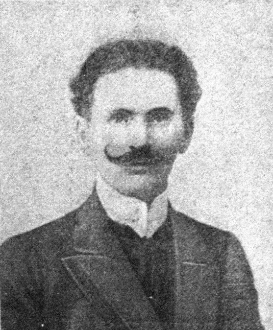 Österreichischer Politiker, Reichsratswahl 1907, Name siehe Dateiname